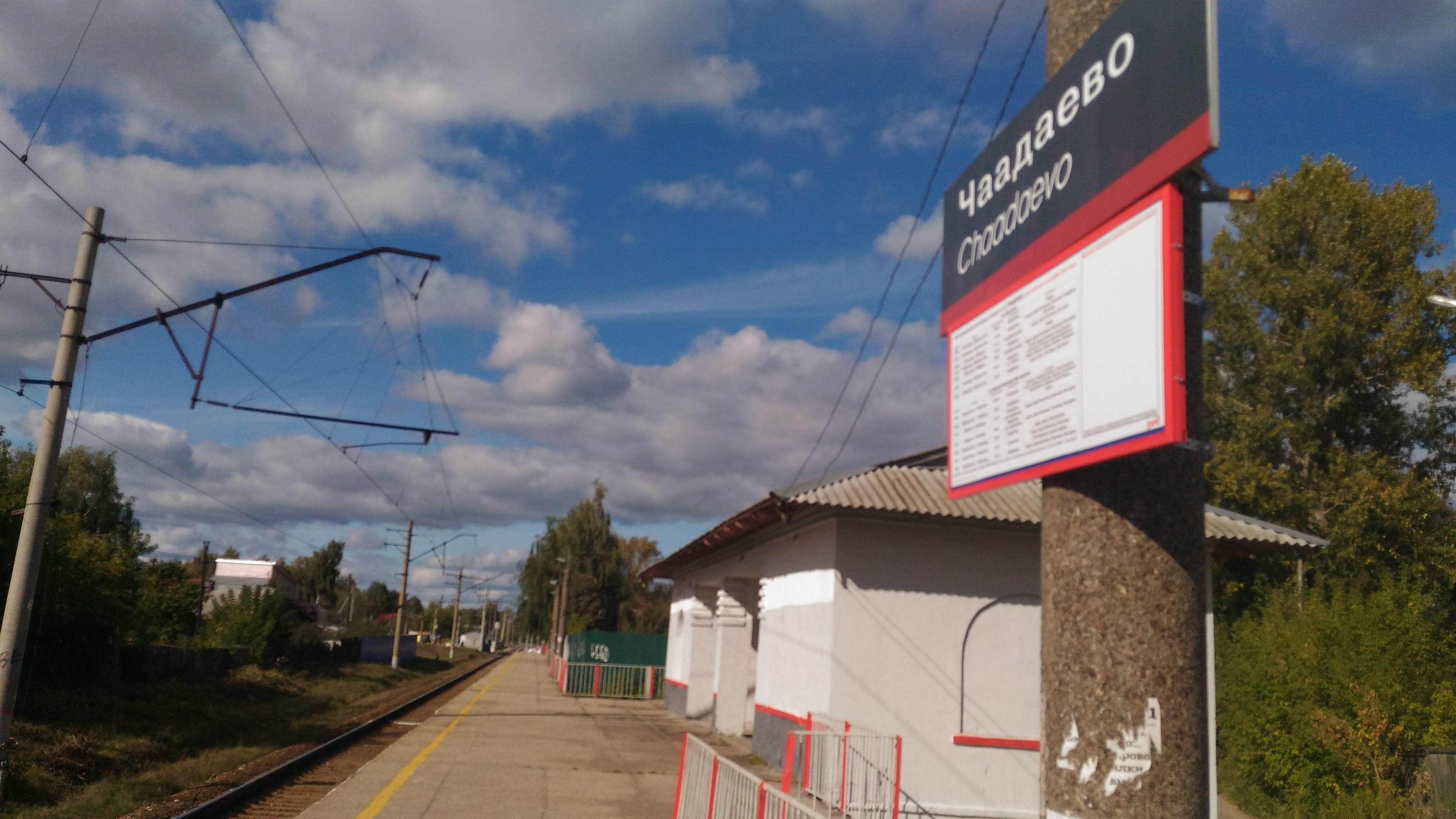 Нижний Новгород. Остановочный пункт Чаадаево Горьковской железной дороги